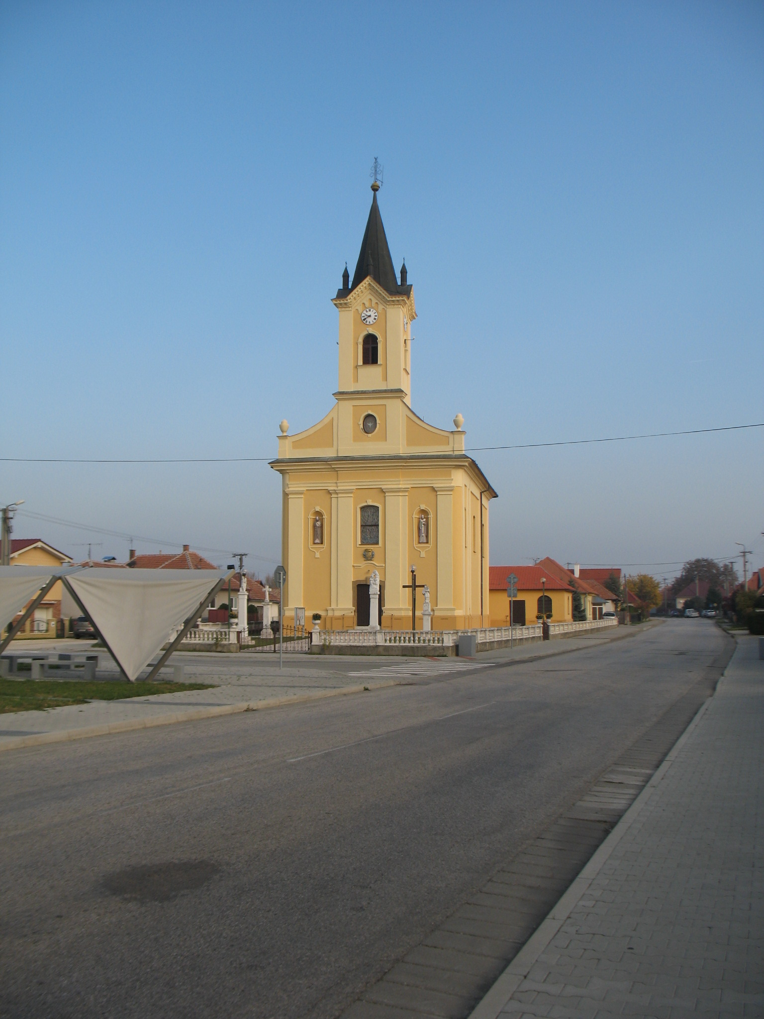 Zsitvafödémes temploma